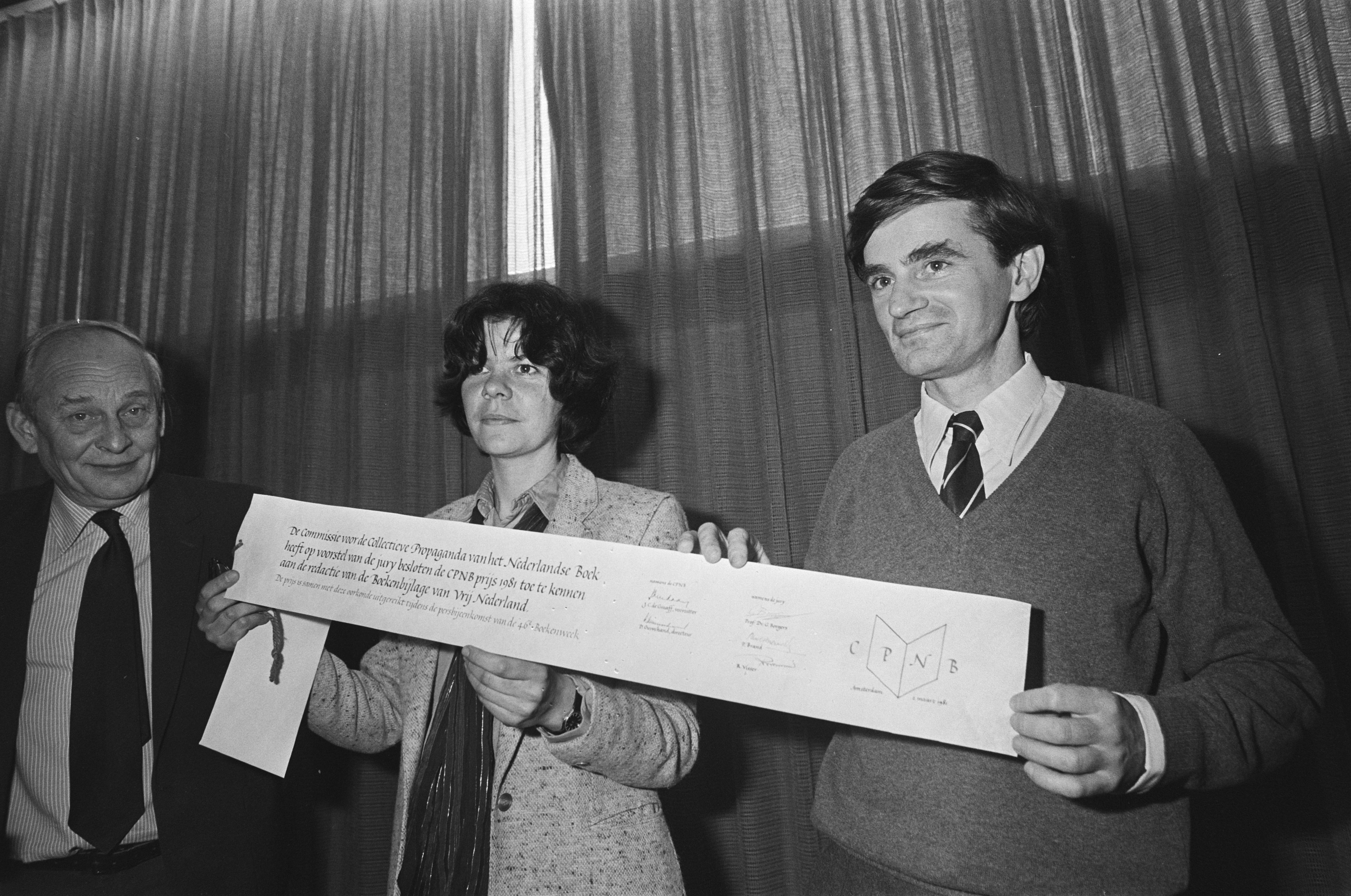 Collectie / Archief : Fotocollectie Anefo Reportage / Serie : [ onbekend ] Beschrijving : Persconferentie in Amsterdam van CPNB i.v.m boekenweek die van 26-03 t/m 04-04 wordt gehouden, Doeschka Meysing en Carel Peeters ontvingen CPNB-prijs Datum : 2 maart 1981 Locatie : Amsterdam, Noord-Holland Trefwoorden : BOEKENWEKEN, persconferenties Persoonsnaam : CPNB Fotograaf : Dijk, Hans van / Anefo Auteursrechthebbende : Nationaal Archief Materiaalsoort : Negatief (zwart/wit) Nummer archiefinventaris : bekijk toegang 2.24.01.05 Bestanddeelnummer : 931-3514